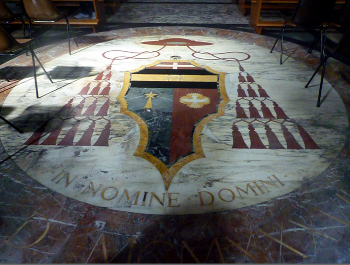 Basilica di San Vitale